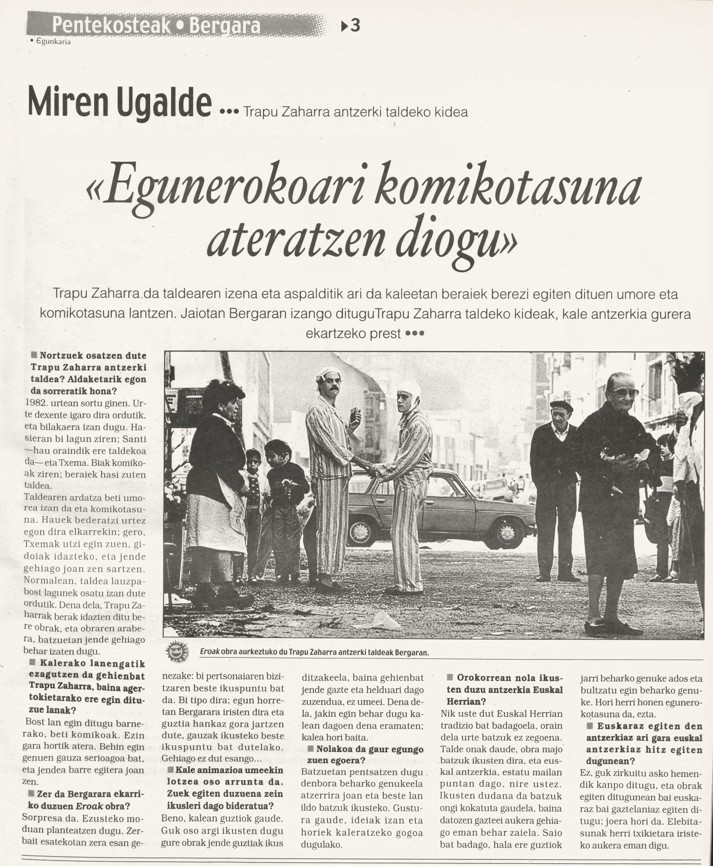 Trapu Zaharra kale antzerkia (Euskaldunon Egunkaria, 2000)